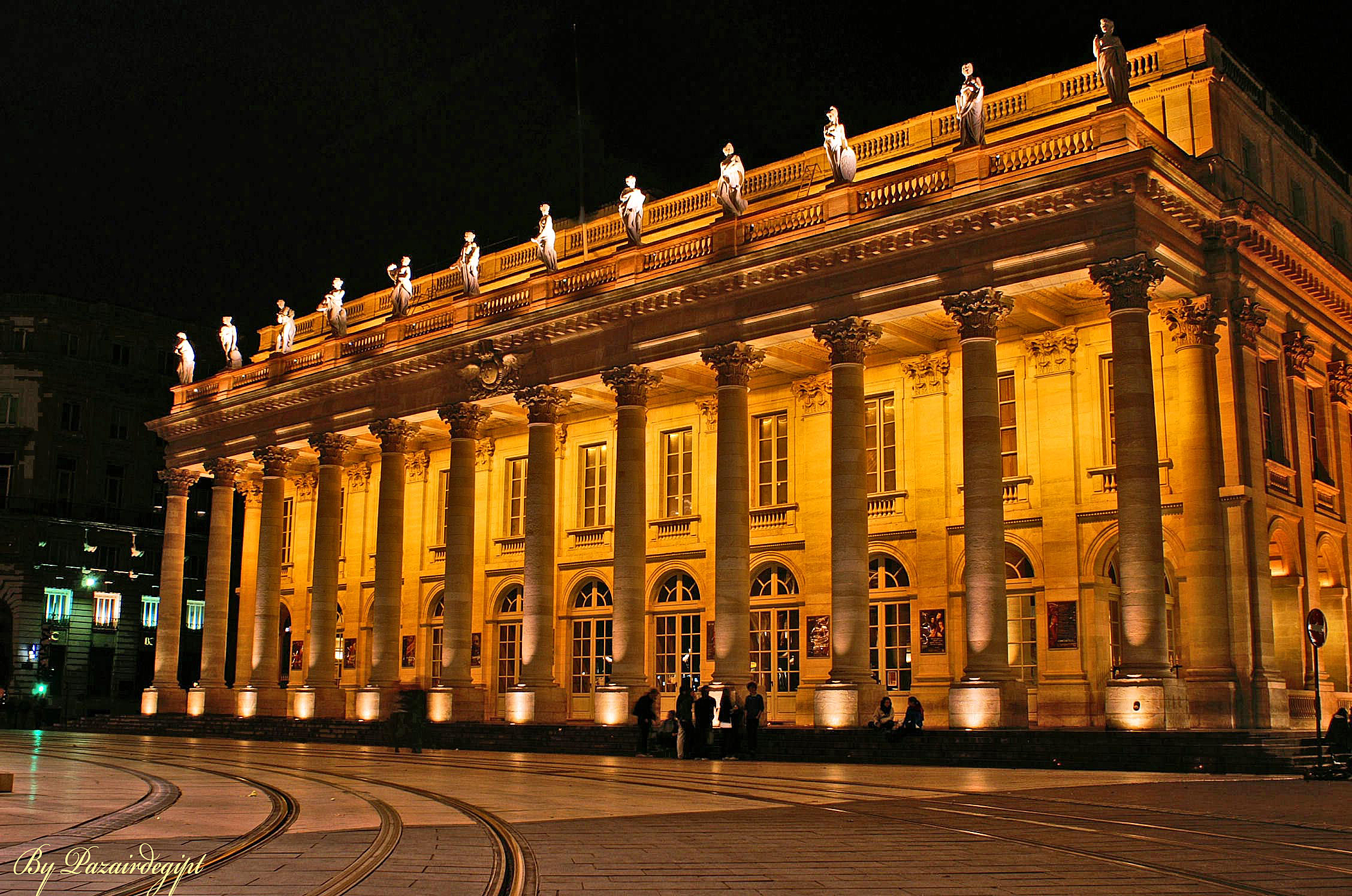 Le Grand Théâtre de Bordeaux, commandé par le maréchal de Richelieu, gouverneur de Guyenne, et édifié par l'architecte Victor Louis, a été inauguré le 7 avril 1780 avec la représentation de l'Athalie de Jean Racine. Classé monument historique, réminiscence de l'Antiquité par son péristyle, l'ouvrage de 88 mètres sur 47 de style néo-classique, s'inscrit dans l'opulent urbanisme bordelais hérité du siècle des Lumières.